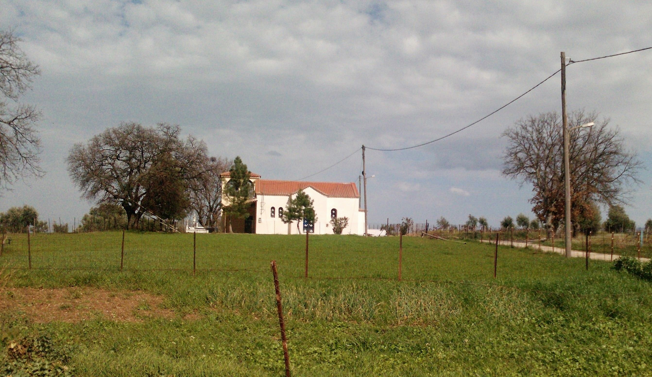 Ι.Ν. Αγίας Παρασκευής, Κουνελαίικα Αχαΐας